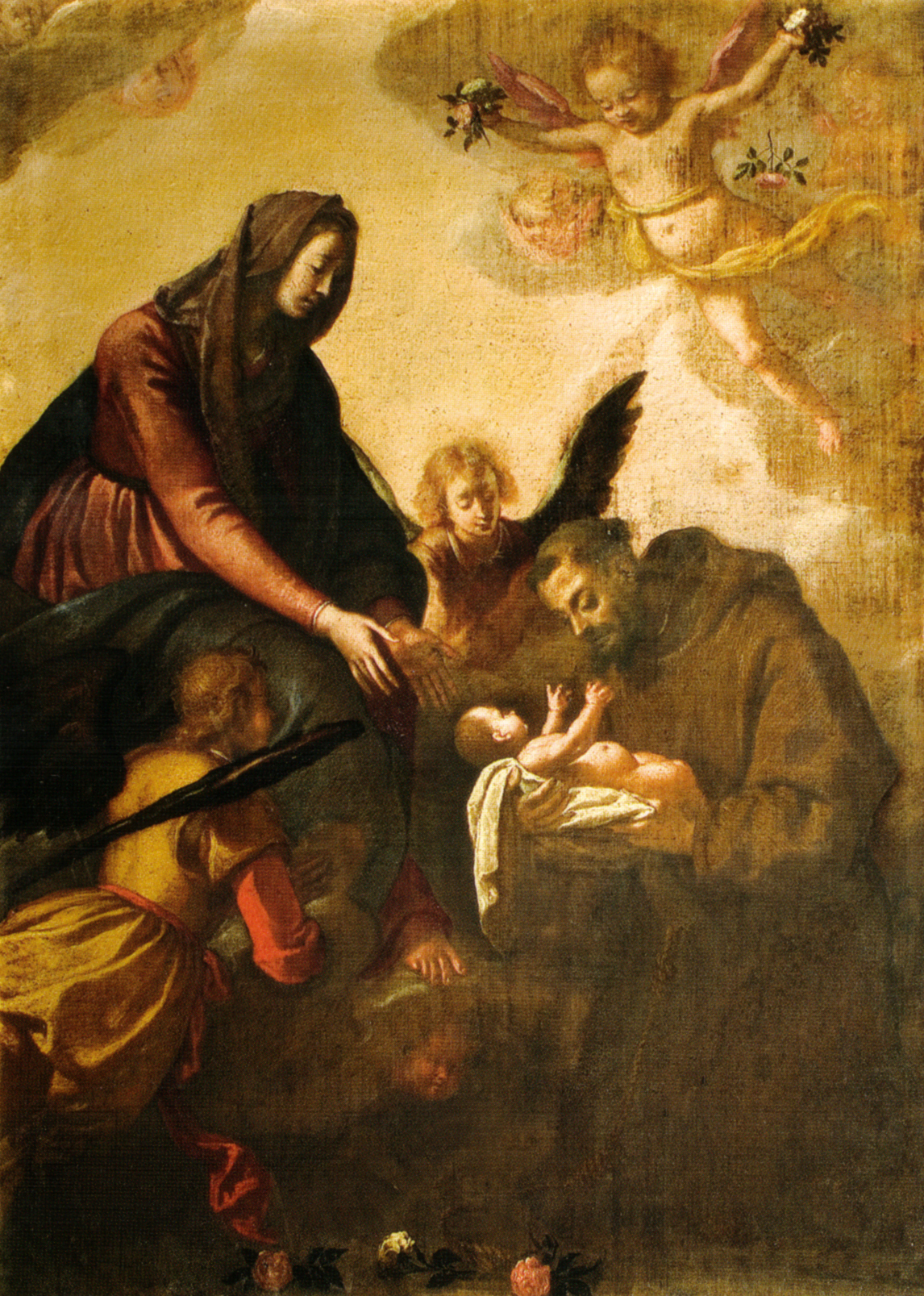 Jacopo chimenti detto l'empoli, madonna che porge il bambino a san francesco